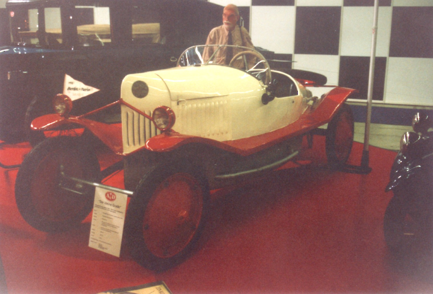 Summary Der kleine Grade Bj.1920-24 Zyl. : 2 Hubr.: 800 ccm PS : 16 Km/h : 80 Kg : 400 Quelle: selbst fotografiert, IAA 1999 Fotograf: Späth Chr. Licensing